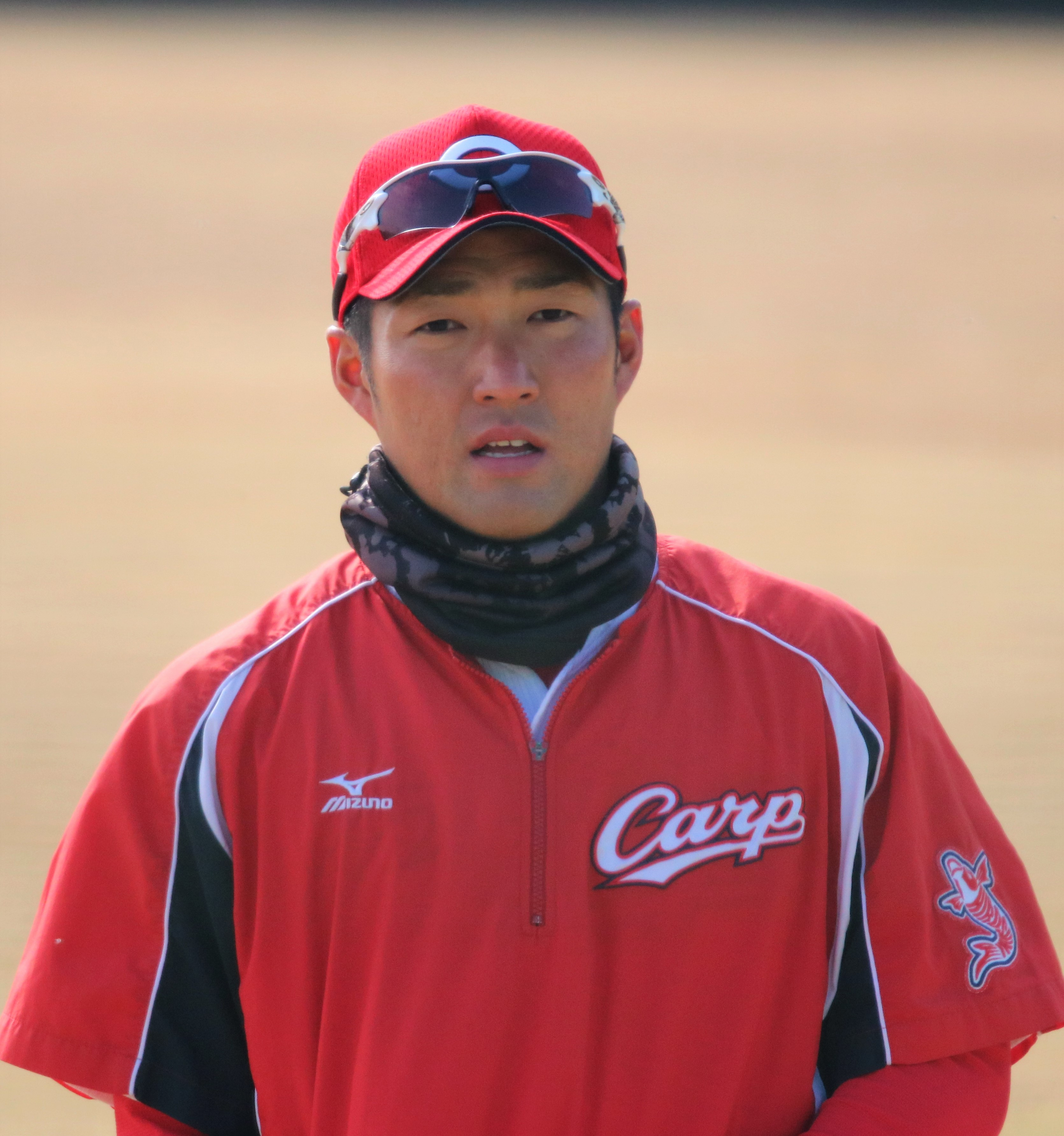 2018/2/8 東光寺球場